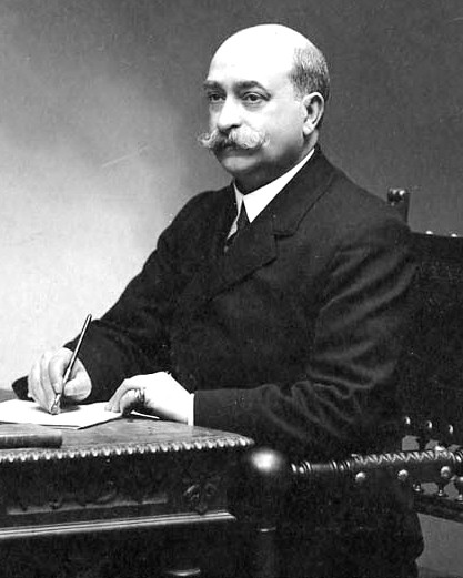 Fotografía del año 1917.